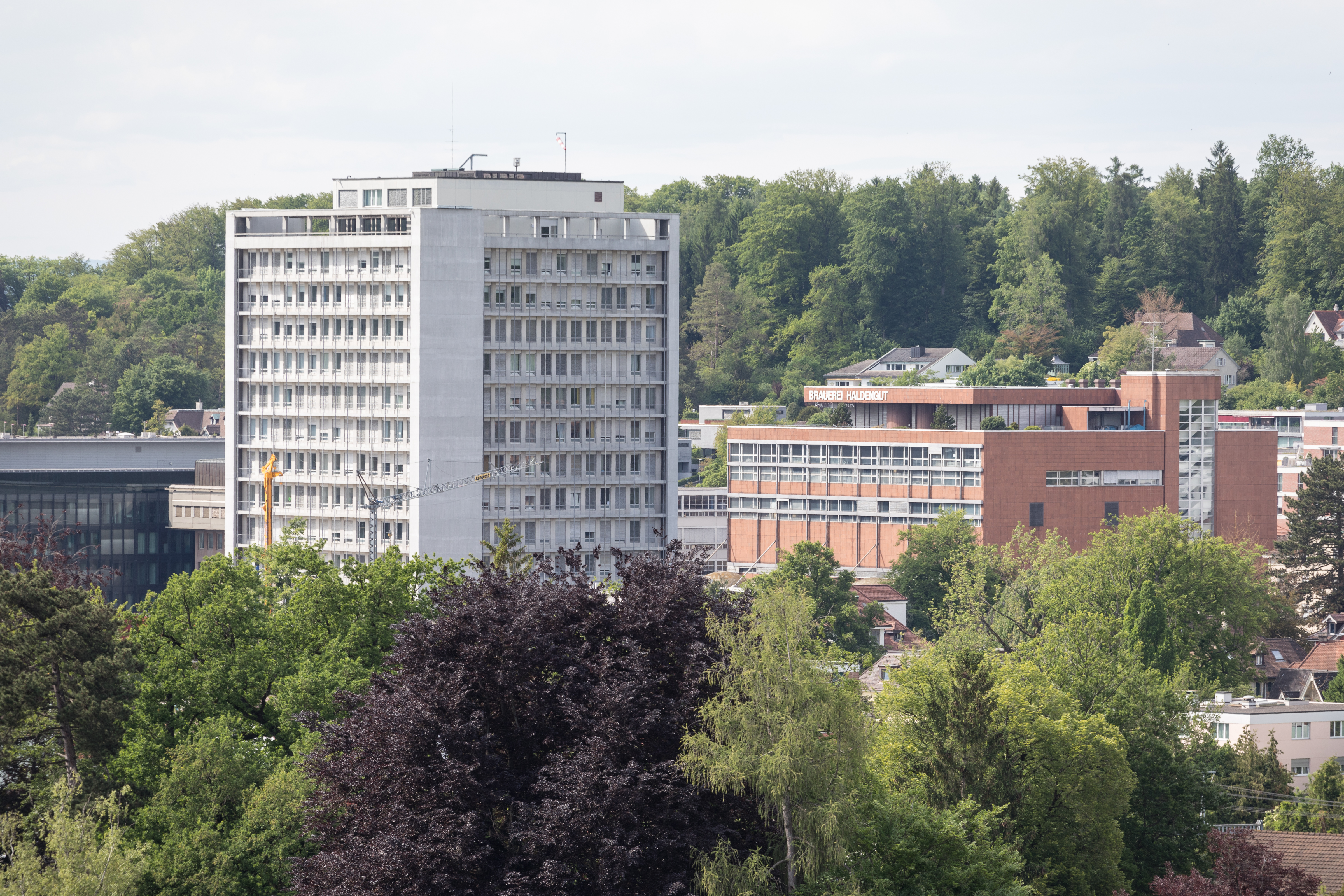 Seit an Seit: Gebäude der (ehemaligen) Brauerei Haldengut und des Kantonsspitals Winterthur